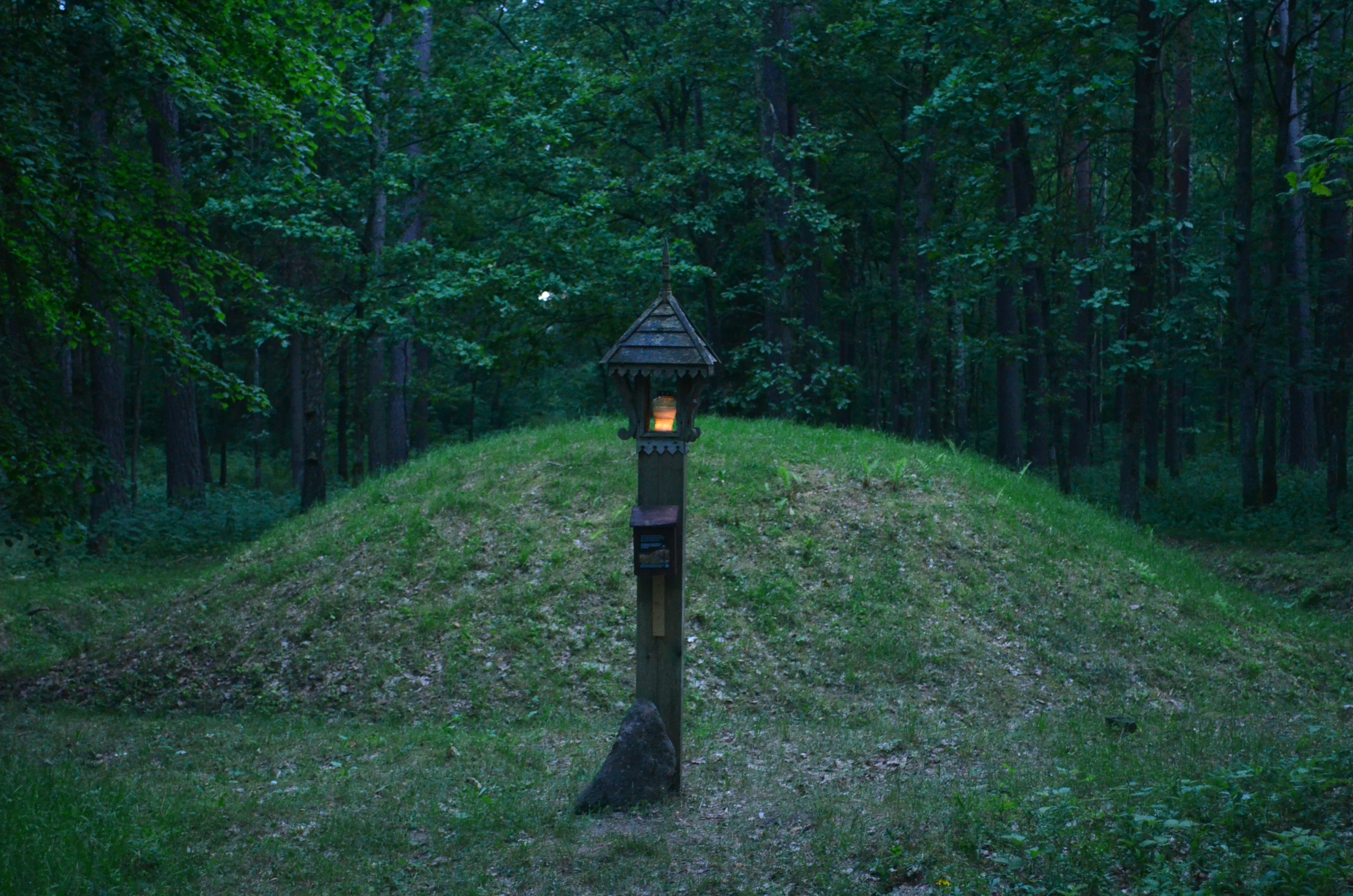 Karmazinų pilkapynas, Vilniaus raj.